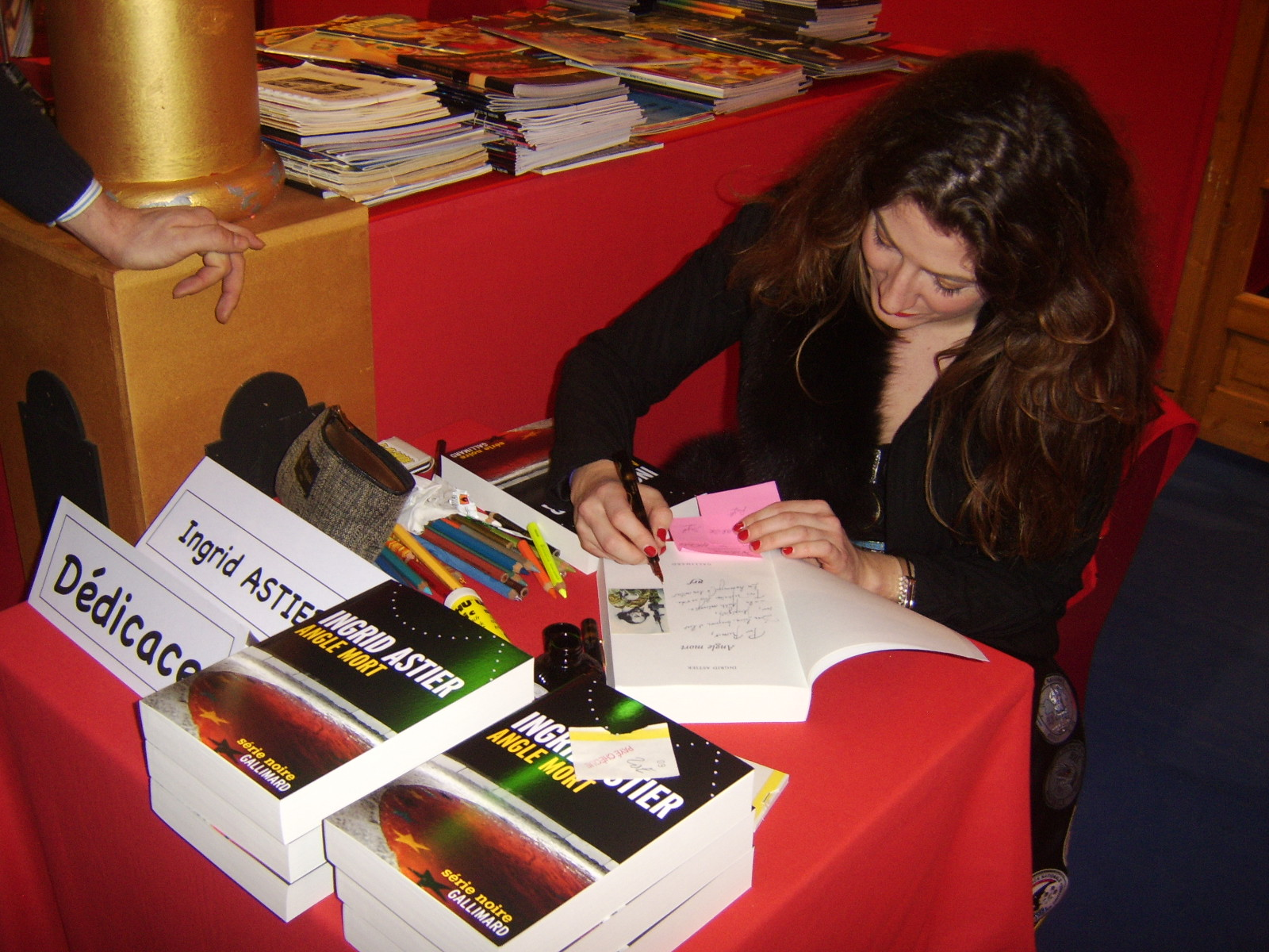 Ingrid Astier dédicace ses œuvres lors du 34ème Festlval Mondial du Cirque de Demain à Paris [Janvier 2013]